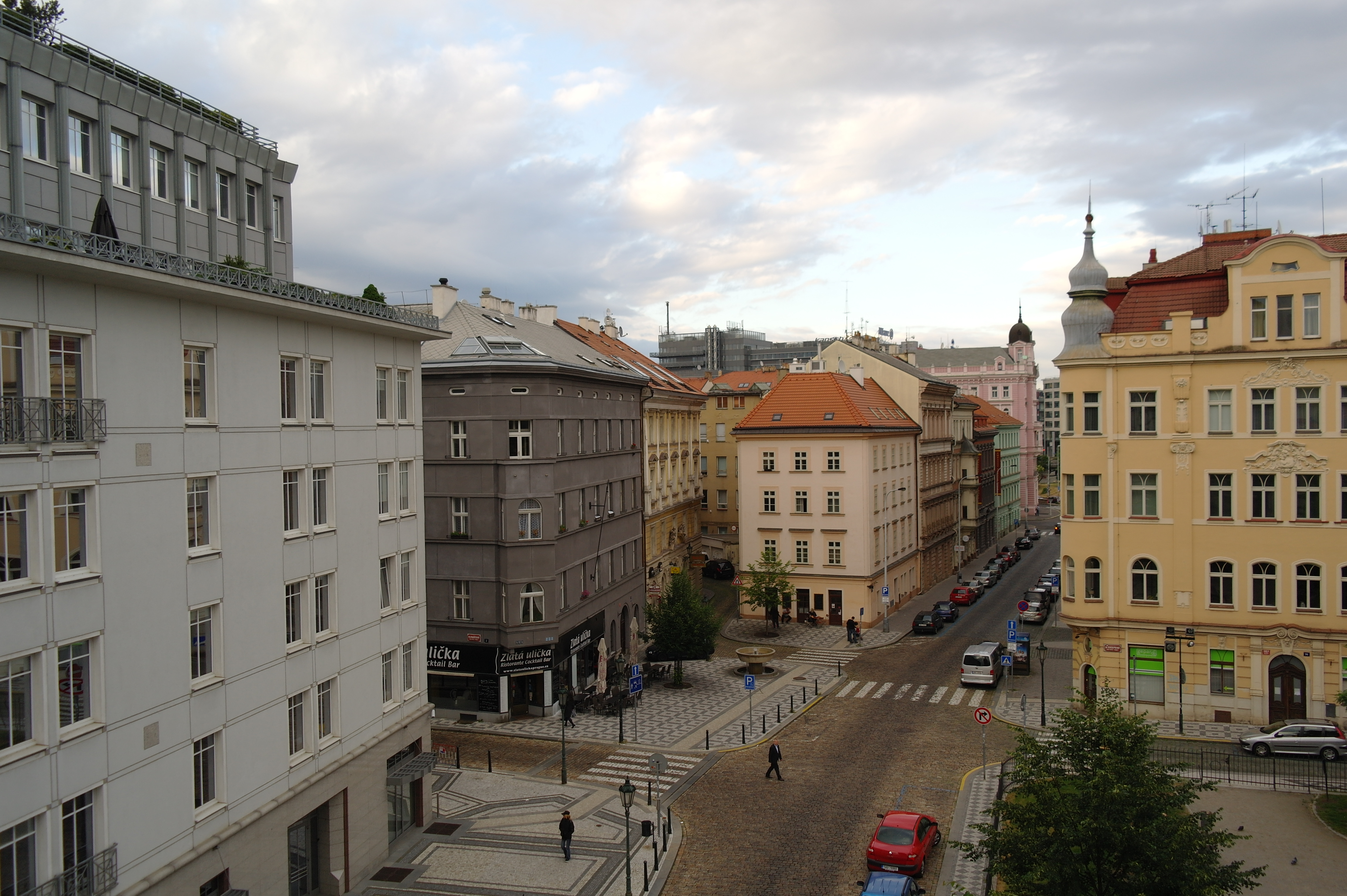 Pohled ze zvonice Kostela sv. Petra na Poříčí směrem na východ